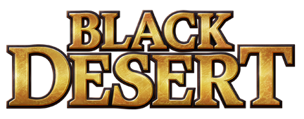 Изображение для игры